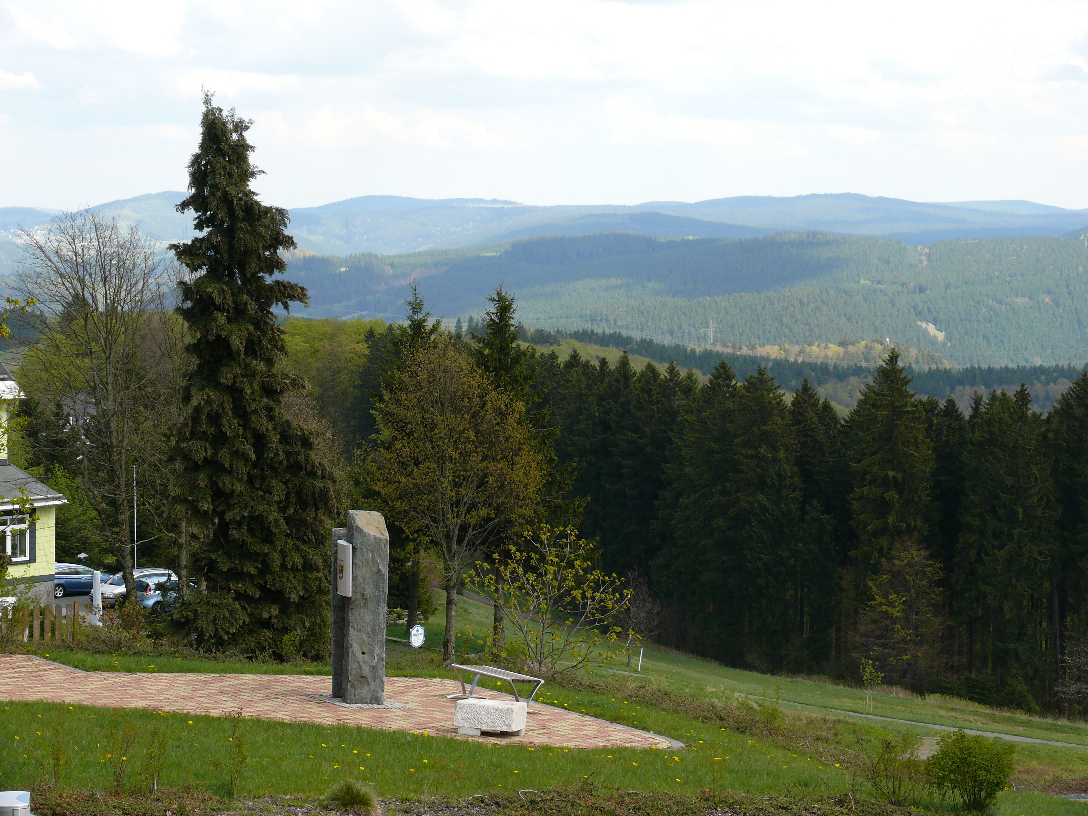 Blick vom Luftkurort Masserberg (Thüringen) auf die umgebende Landschaft.